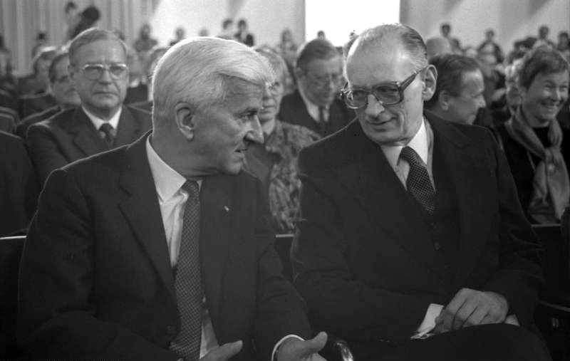 5.10.1986 Verleihung des Friedenspreises des deutschen Buchhandels an polnischen Historiker und Publizisten Wladyslaw Bartoszewski durch den Vorsitzenden des Börsenvereins des deutschen Buchhandels, Günther Christiansen, in der Frankfurter Paulskirche.